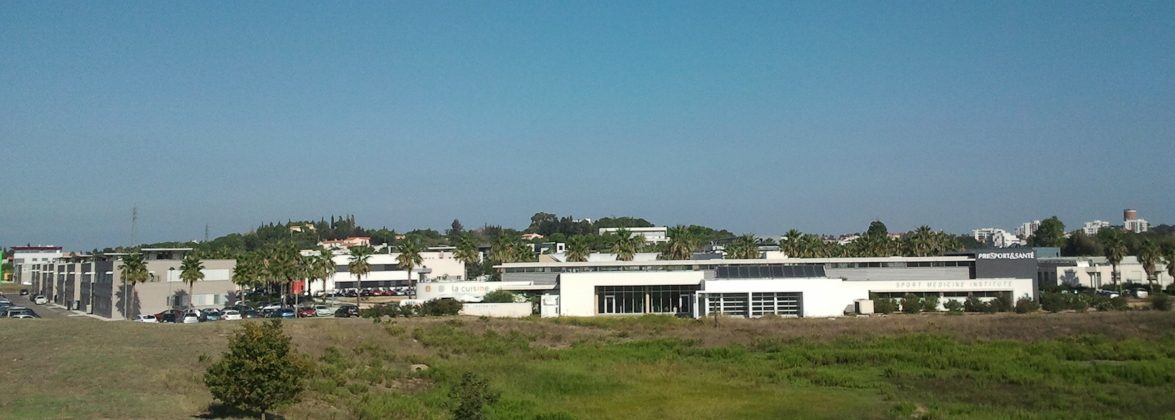 Le parc Tecnosud à Perpignan